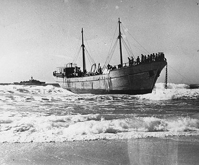 אוניית המעפילים שבתאי לוז'ינסקי